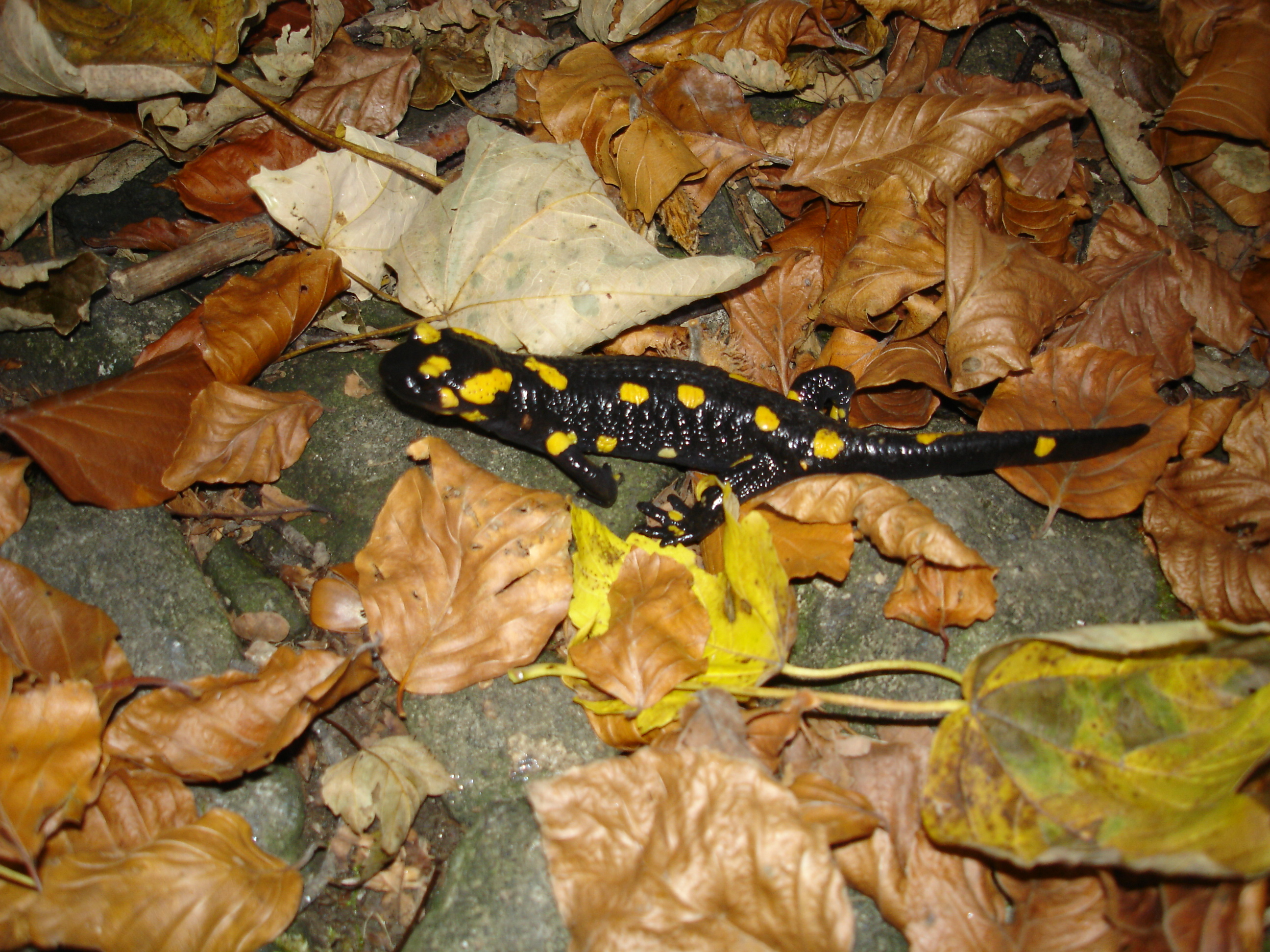 Salamander - Salamandra salamandra beschkovi in Vitosha, Bulgaria